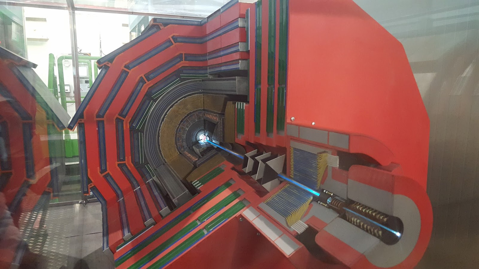 דגם המראה את פנים הגלאי הCMS